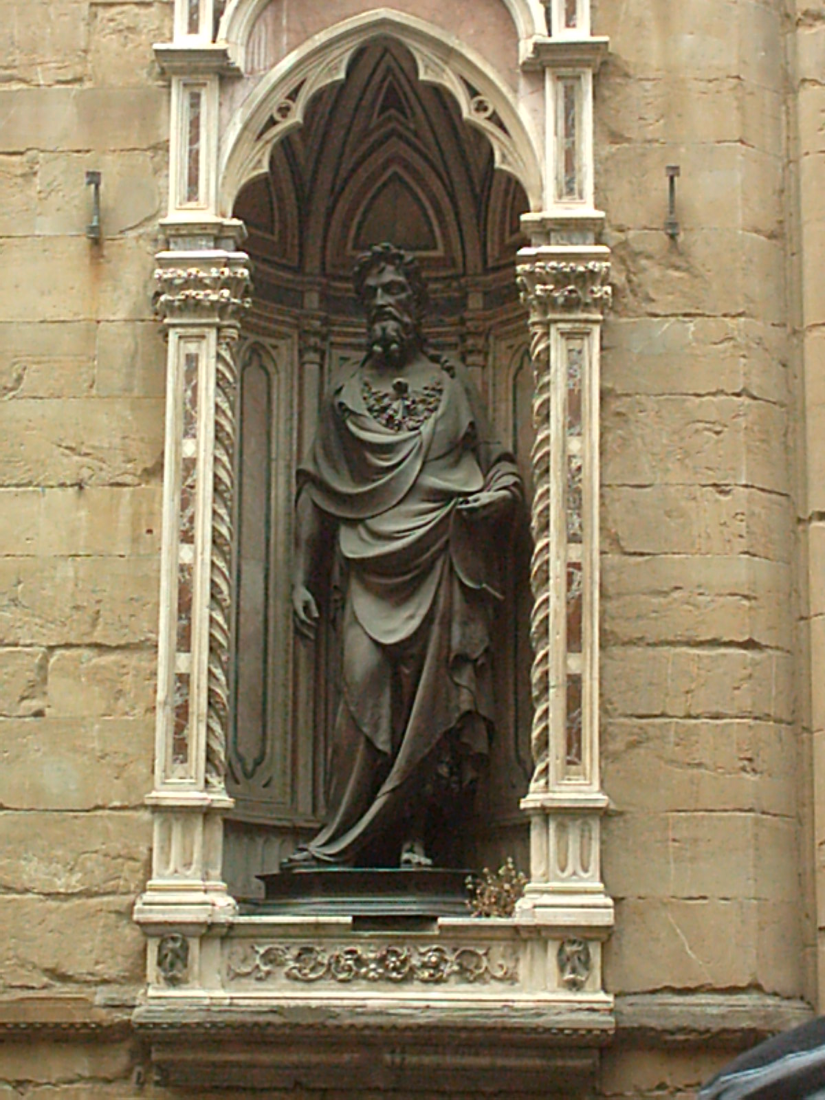 Statua di San Giovanni Battista protettore dell'arte di Calimala di Lorenzo Ghiberti (1413-16) su un "tabernacolo" (= nicchia esterna) della chiesa di Orsanmichele.